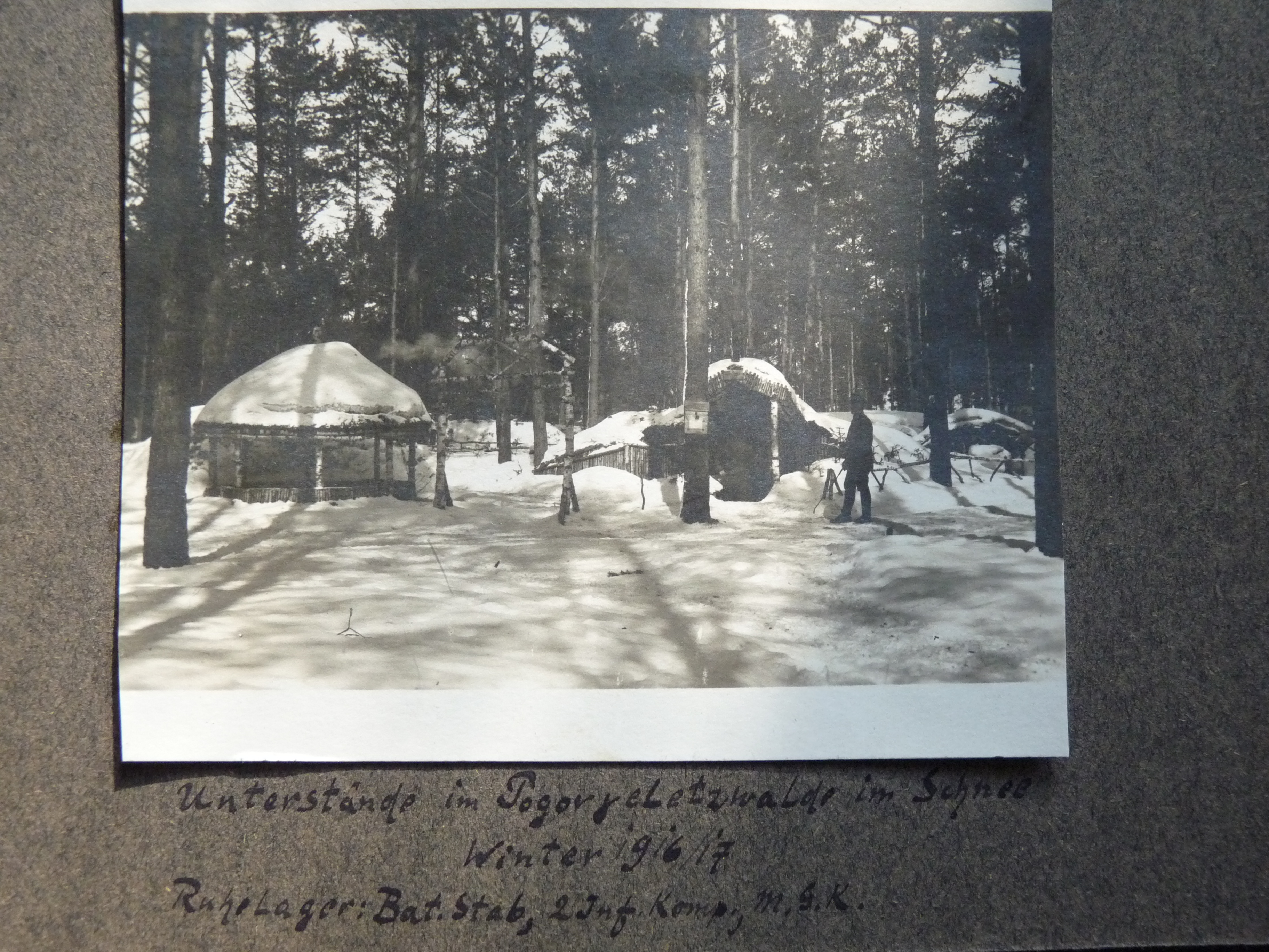 Unterstände im Pogorjeletzwald | IR. 403 | Winter 1916/17 (südöstlich Gorodytsche)